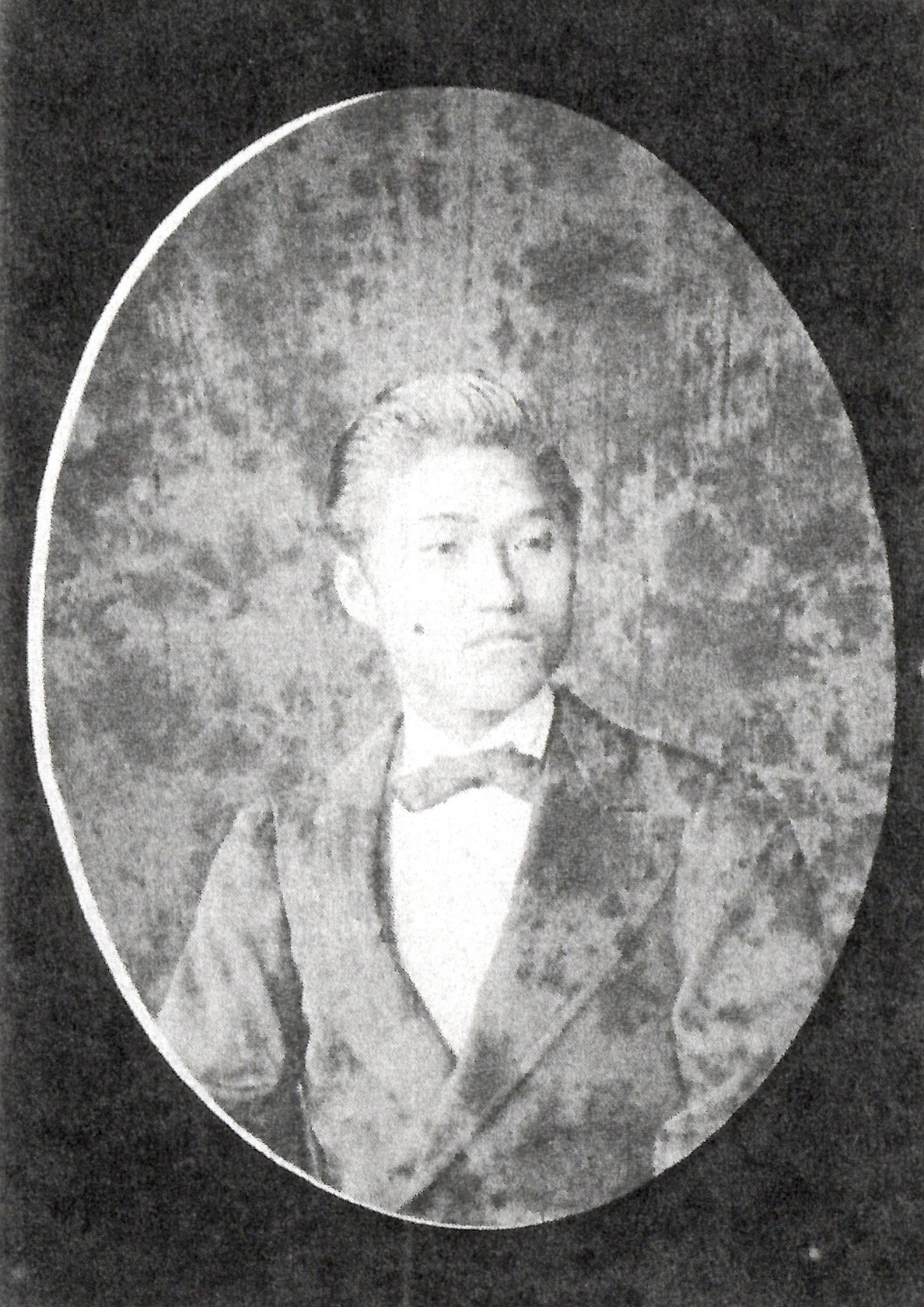 西五辻󠄀文仲の肖像写真。